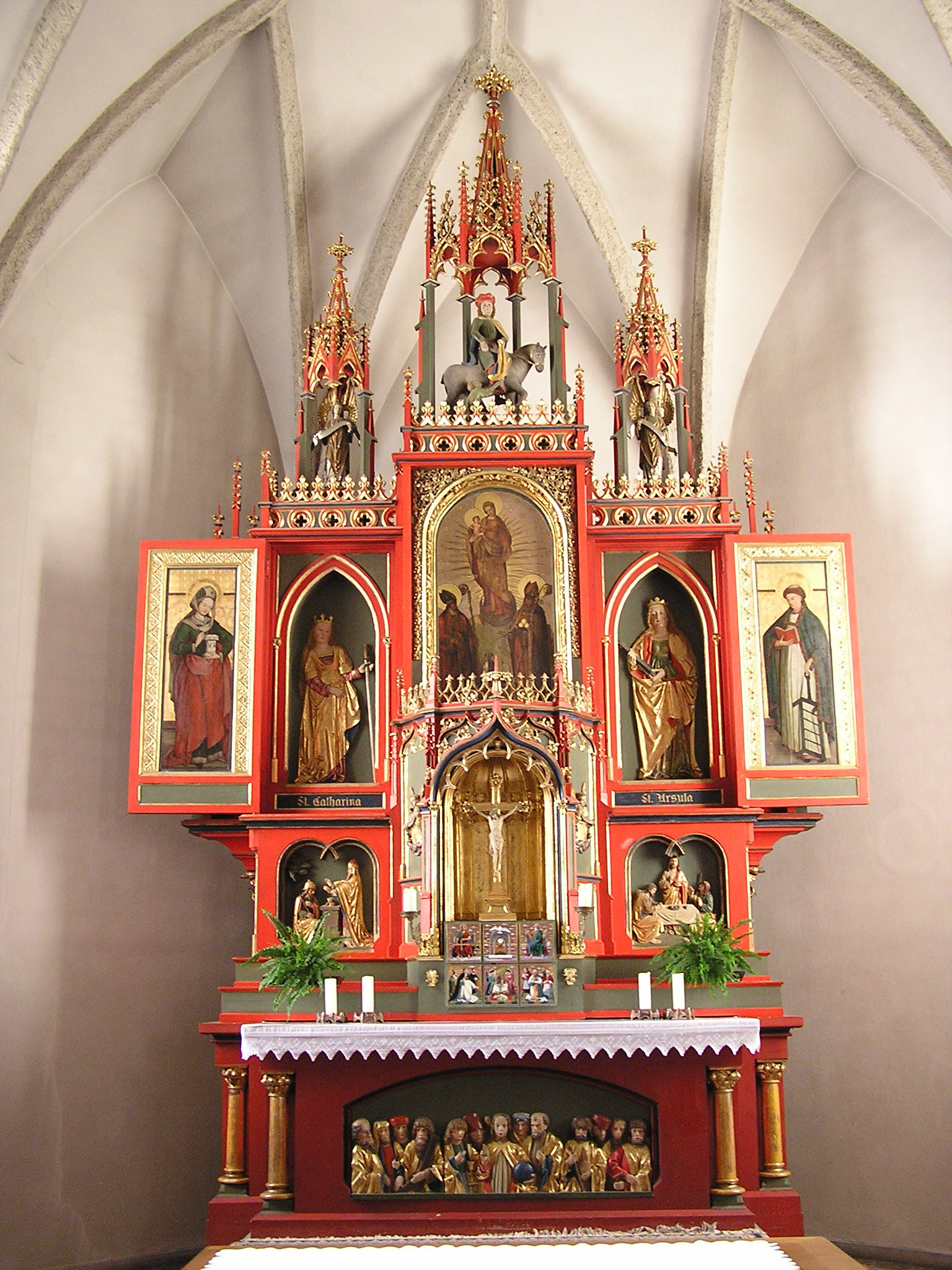 Bürs Martinskirche. Gotischer Altar. Ort & Datum: Bürs, 2003